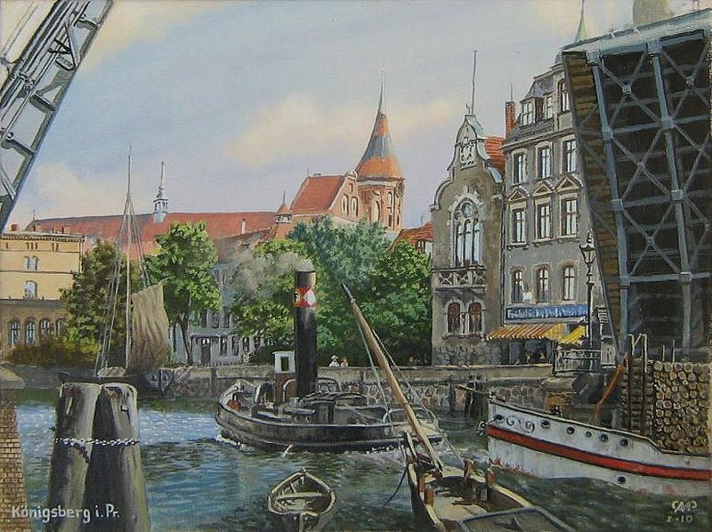 Kolorierte Postkarte mit dem Königsberger Dom und dem (ehemaligen) Corpshaus von Masovia am Alten Pregel mit Promenade und geöffneter Schmiedebrücke in Königsberg